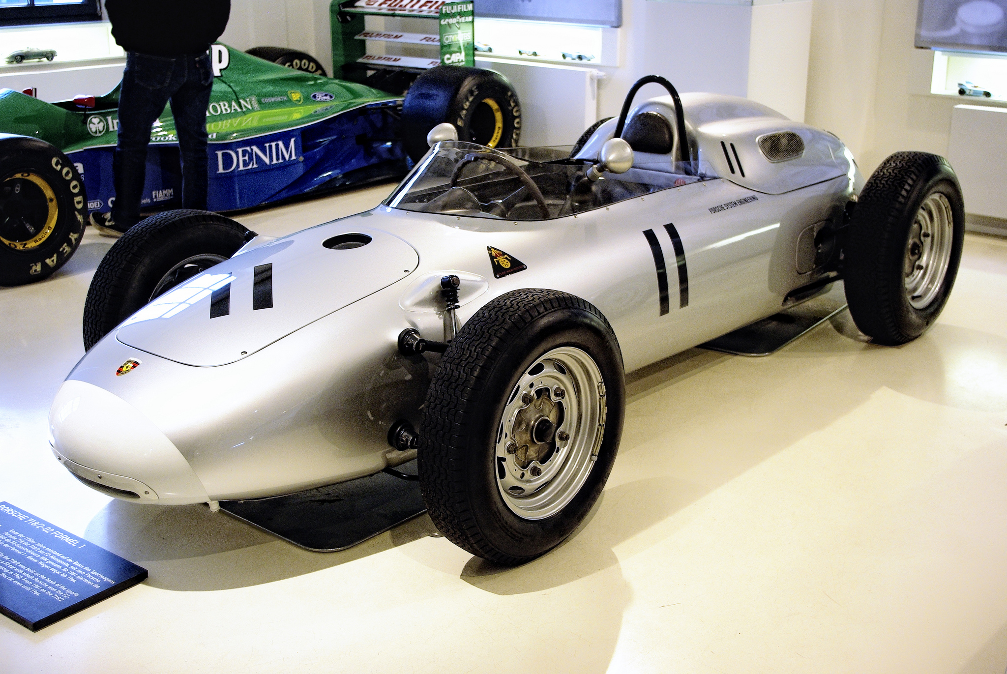 1961 Porsche 718/2-02 F1 Monoposto im Museum Prototyp in Hamburg